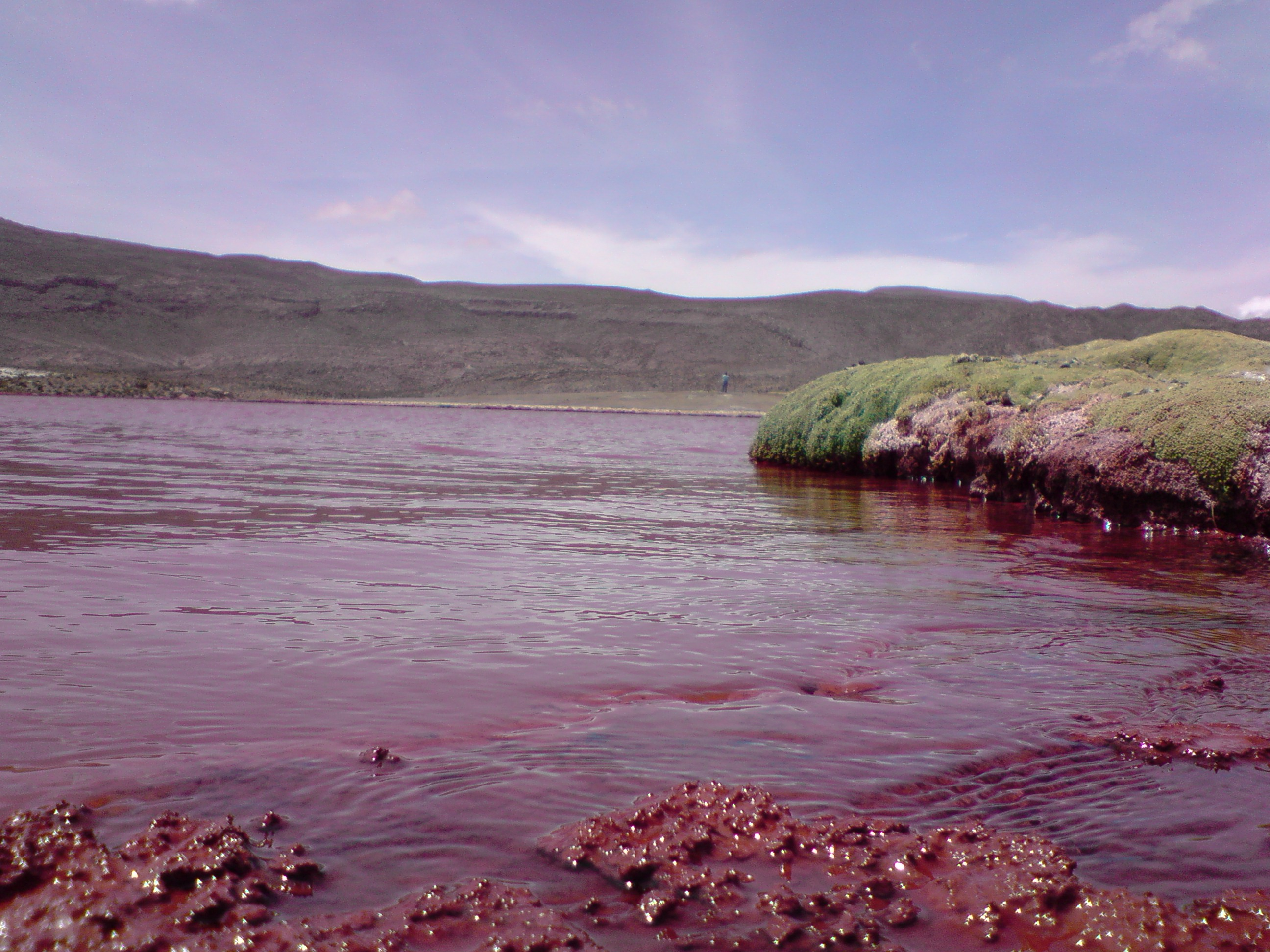 un viaje al interior en busca de la laguna roja.